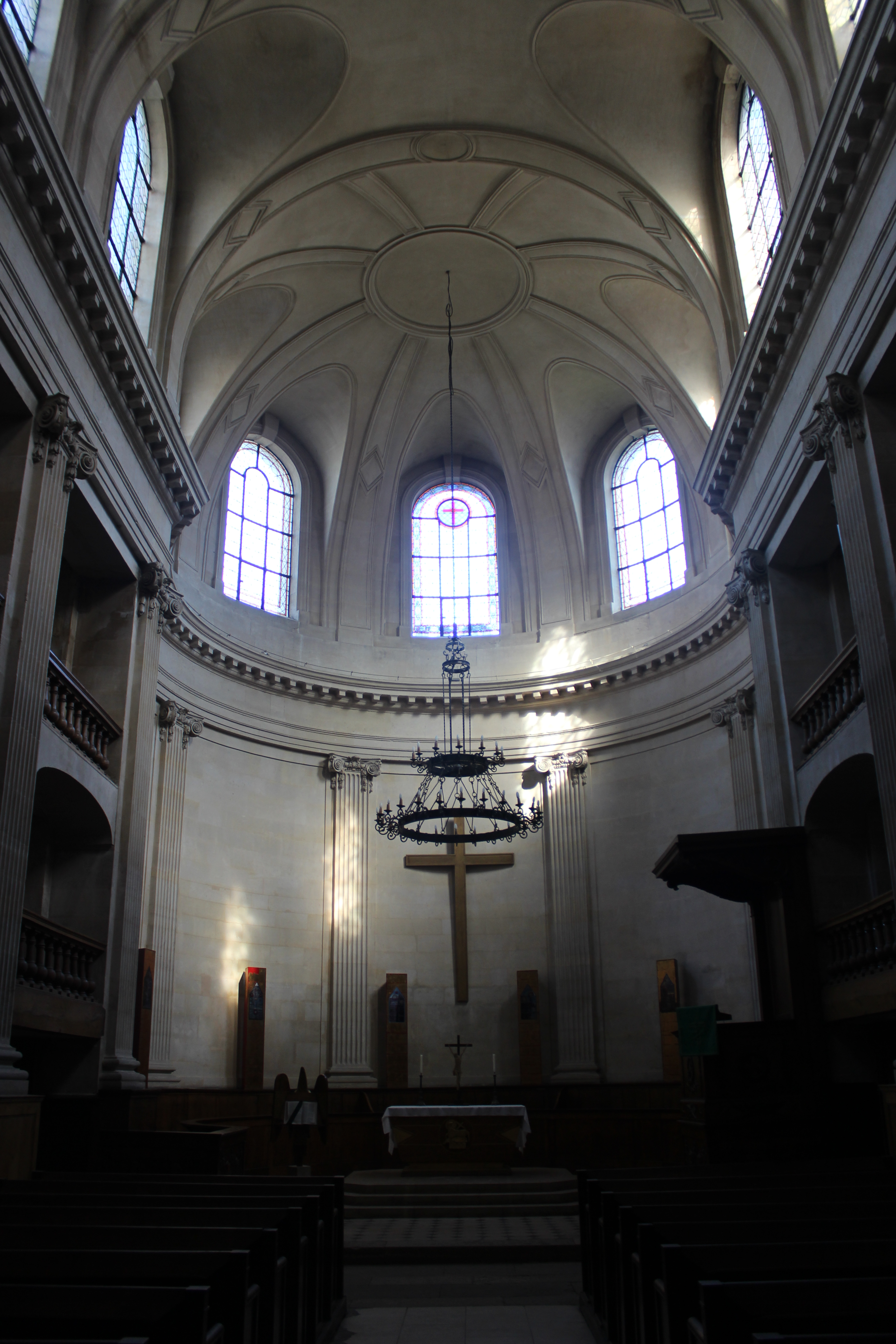 París, Église des Billettes.